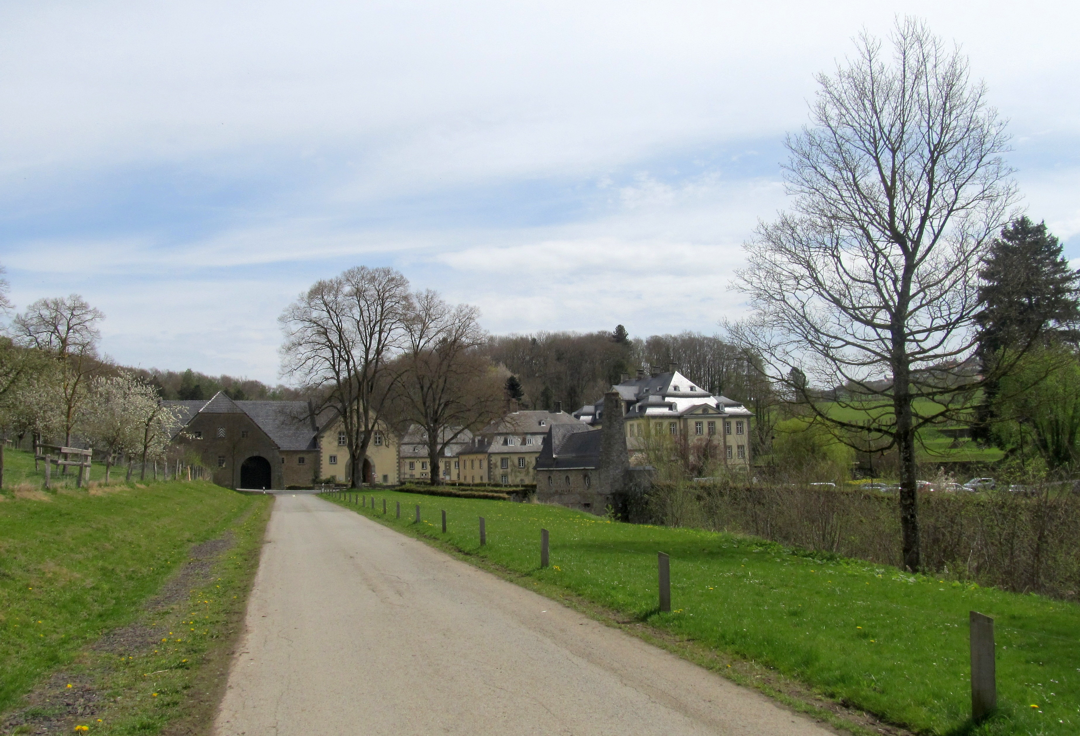 Schloss Körtlinghausen, Rüthen (Germany)